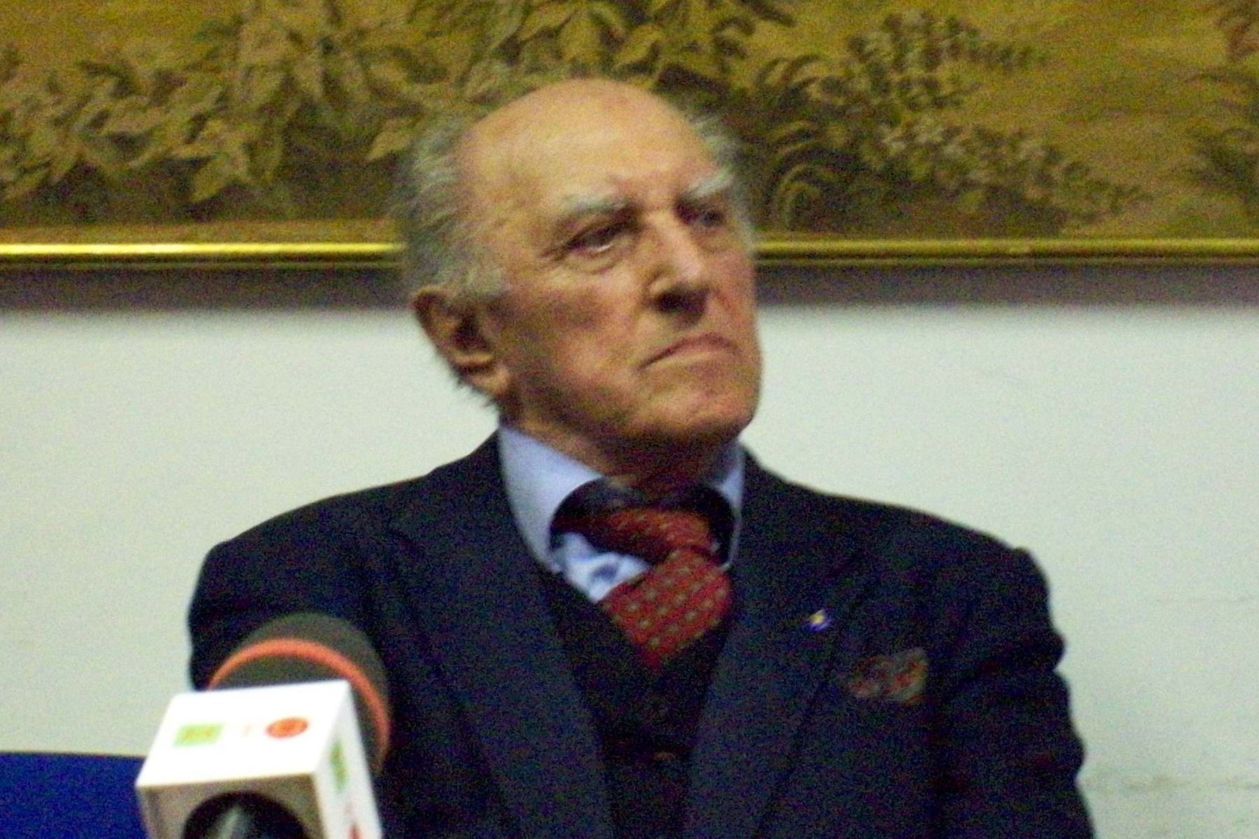 Italian sociologist Franco Ferrarotti during a book presentation in Rome